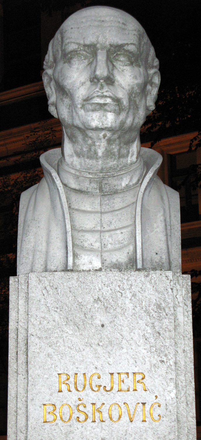 spomenik Ruđeru Boškoviću u Zagrebu, Hrvatska